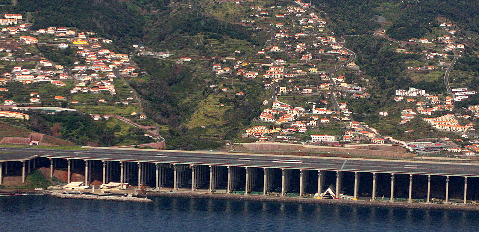 Aeroporto da Madeira_runway